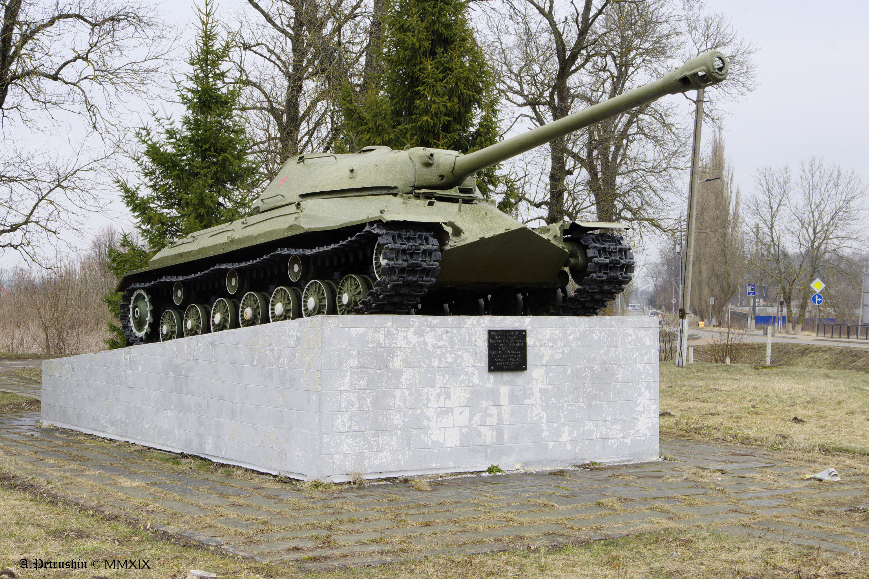 Танк Т-10 на постаменте на выезде из г. Краснознаменск Калининградской обл.